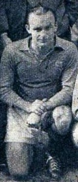 Curt Keller en 1943.